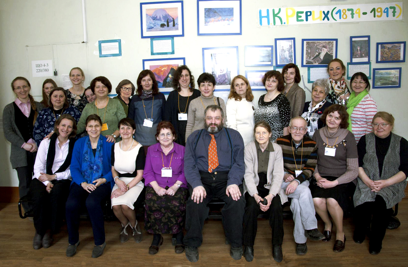 Международная научная конференция «Проблемы онтолингвистики — 2016""